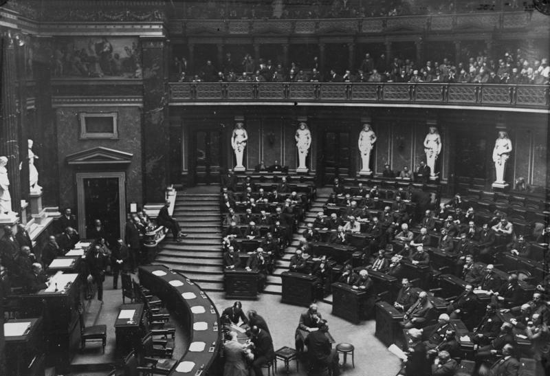 Parlamente aus aller Welt ! Blick in das oesterreichische Parlament während einer Sitzung in Wien.